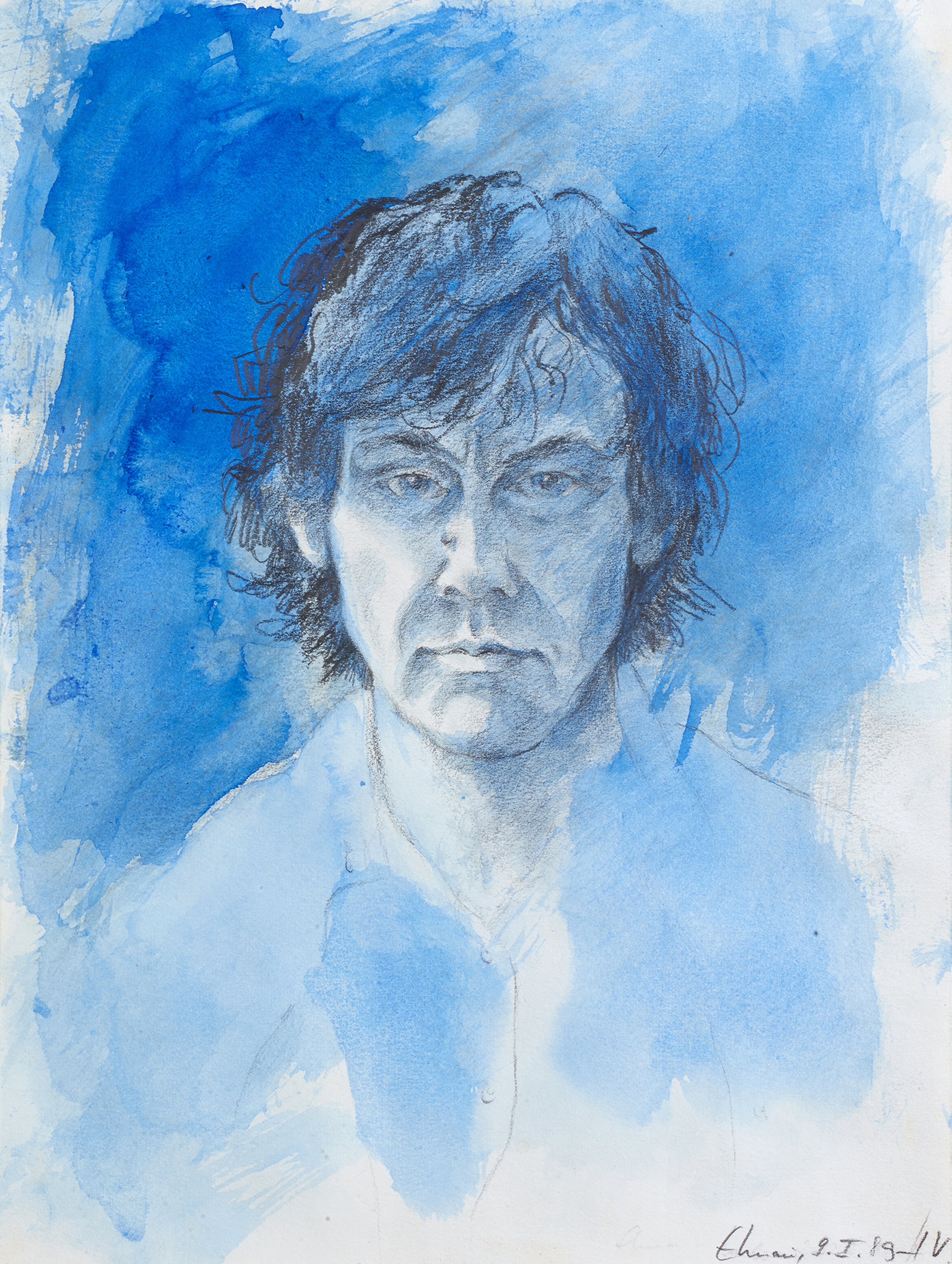 Selbstporträt des Bratschisten des Melos Quartetts; Hermann Voss; angefertigt auf Schloss Elmau am 9 Januar 1989; Bleistift und Aquarell